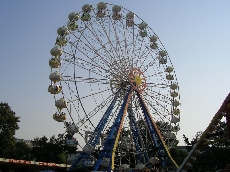 Ρόδα σε λούνα παρκ.